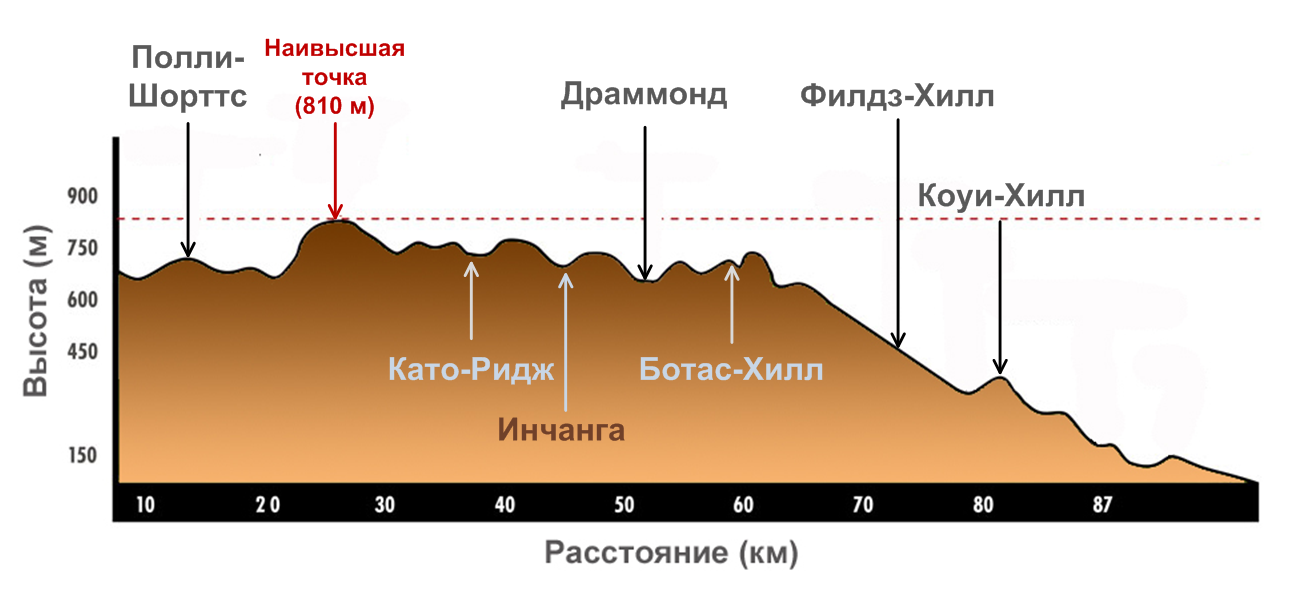 Профиль трассы сверхмарафонского пробега The Comrades Marathon